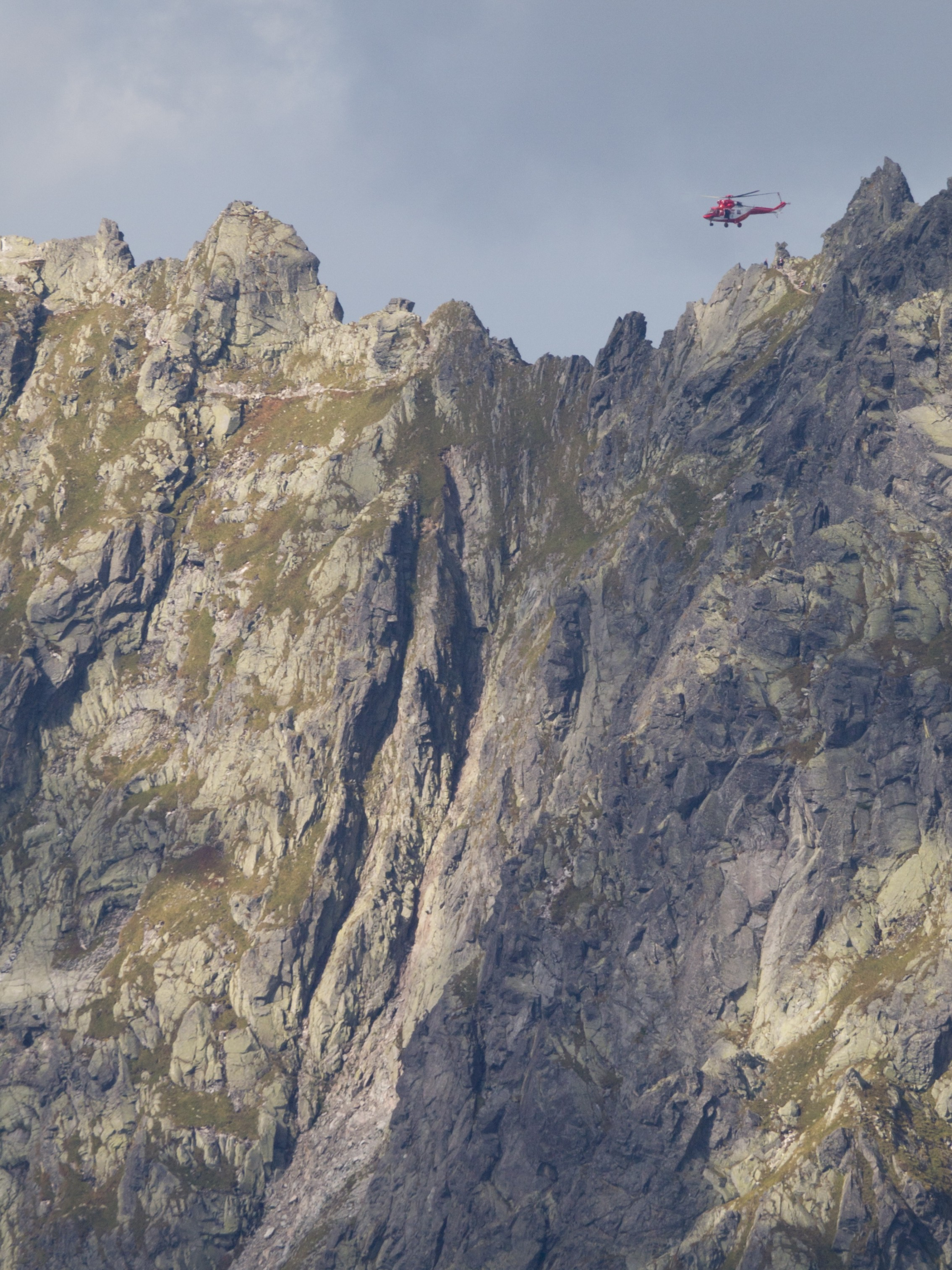 Po lewej Buczynowe Czuby, pośrodku Przełęcz Nowickiego, po prawej Budzowa Igła (na lewo od niej śmigłowiec TOPR)